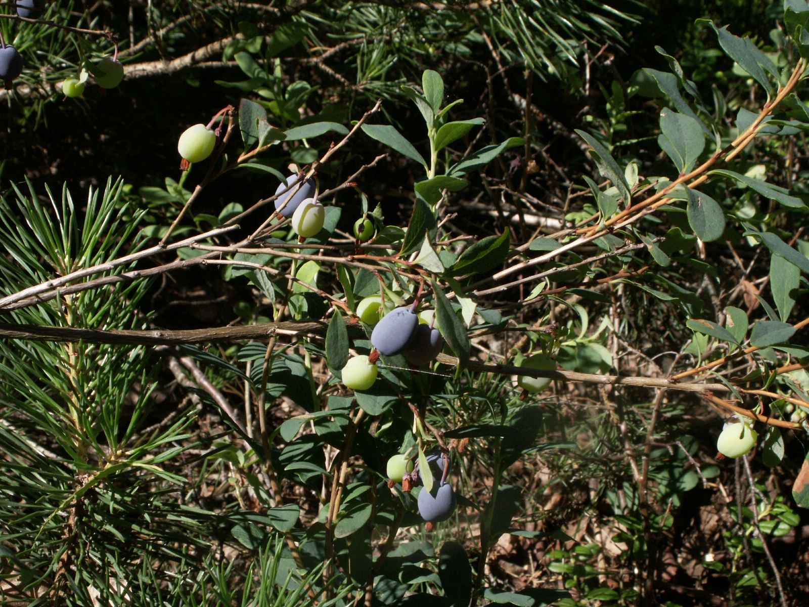 Rauschbeere, reifende Beeren